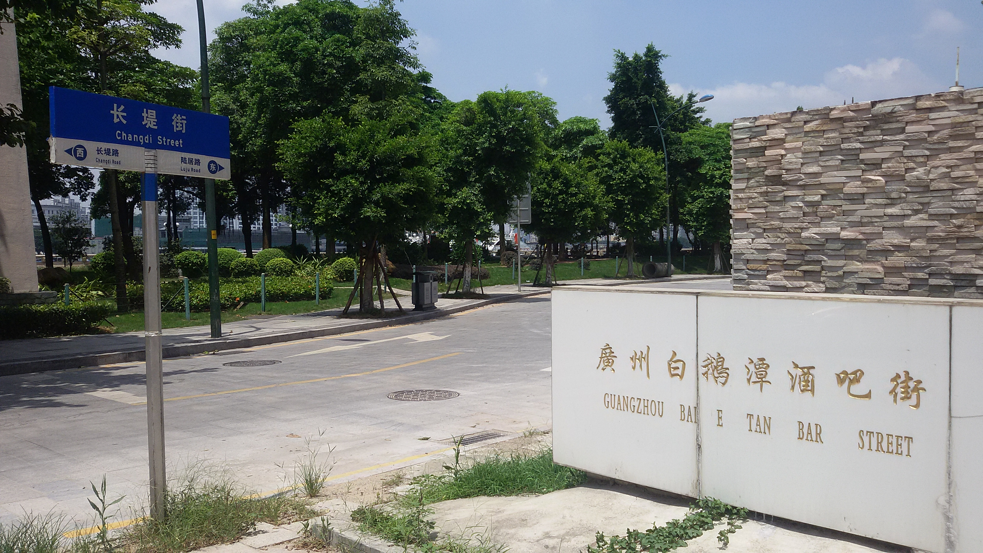 粵語: 白鵝潭風情酒吧街